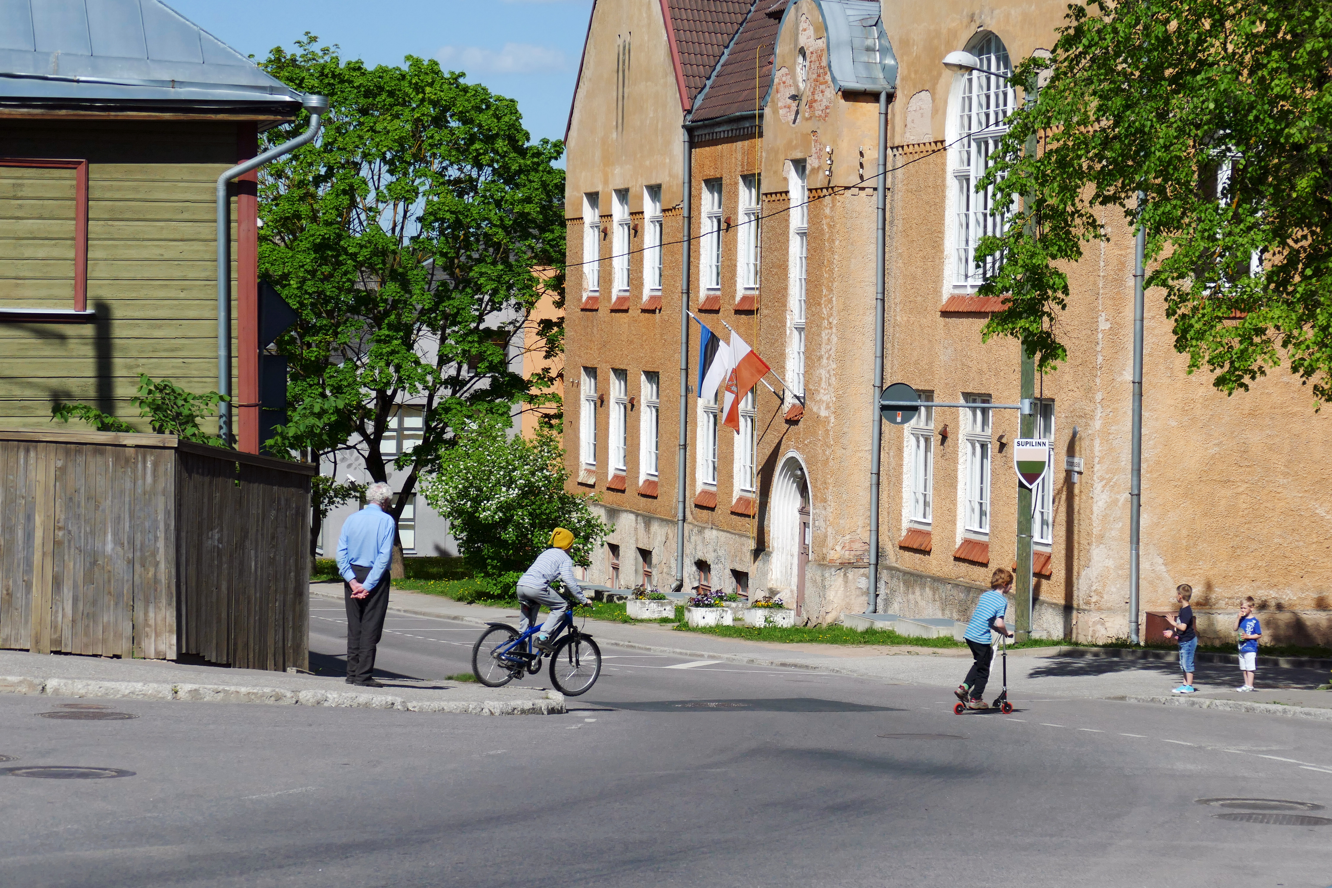 Tour of Estonia Tartu Grand Prix 2. etapp Tartu tänavatel 30.05.2015. Grupisõit 150km.